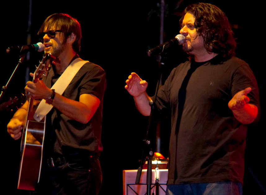 Lillo e Greg, Latte e i suoi derivati. Terni 3 Settembre 2010. Parco La Passegiata